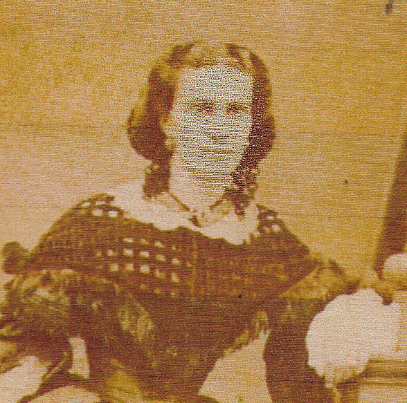 Emilia Solar Vardes contrajo matrimonio con Francisco Vargas Fontecilla. Fotografía de 1876 en Santiago de Chile. Original que se encuentra en álbum familar.